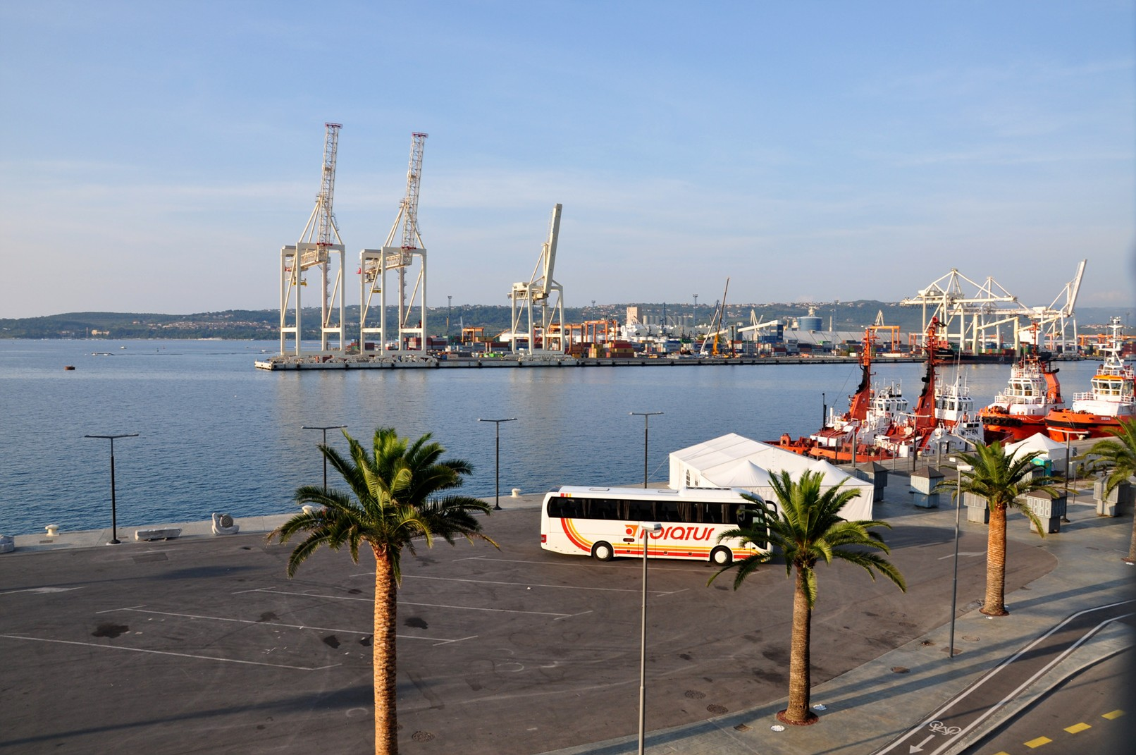 Koper (161)